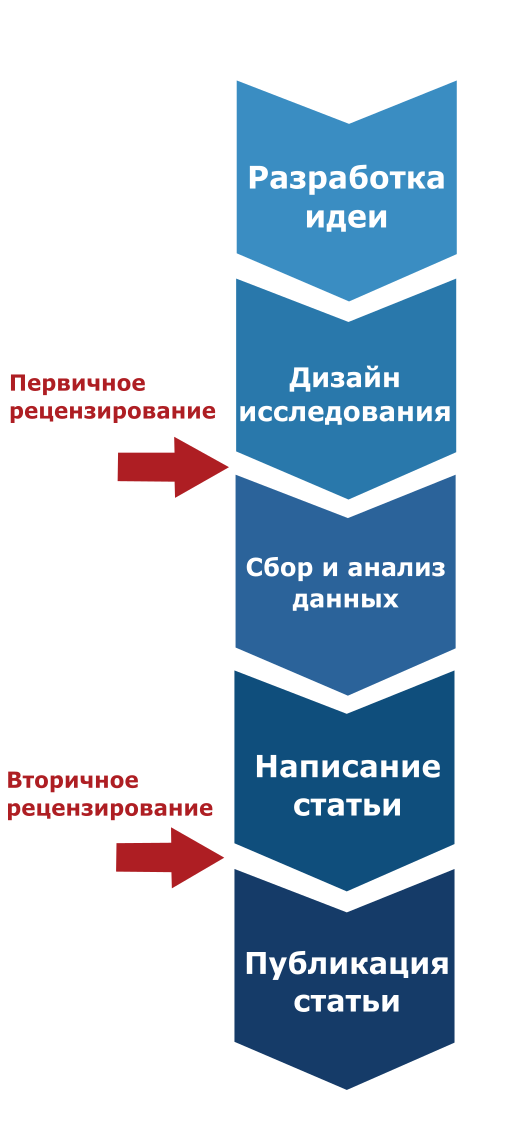 Схема стадий пререгистрированных исследований